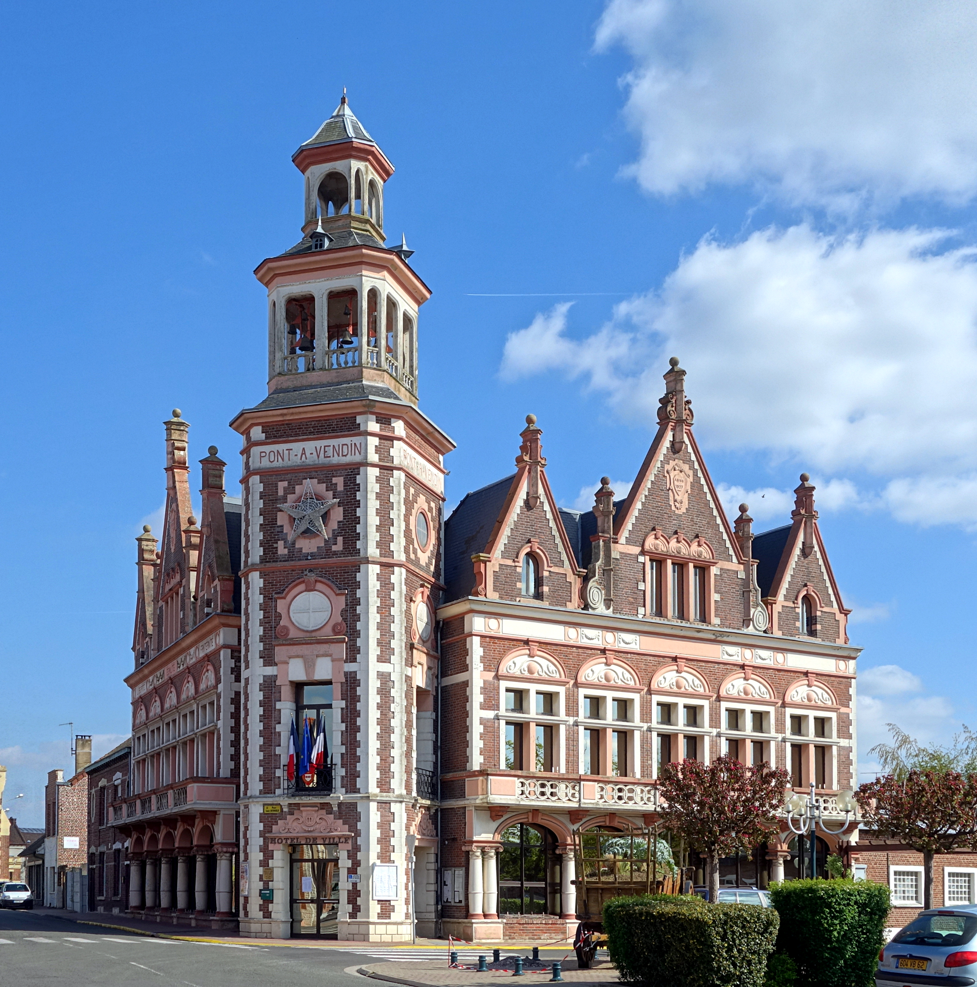 L'hôtel de ville de Pont-à-Vendin.